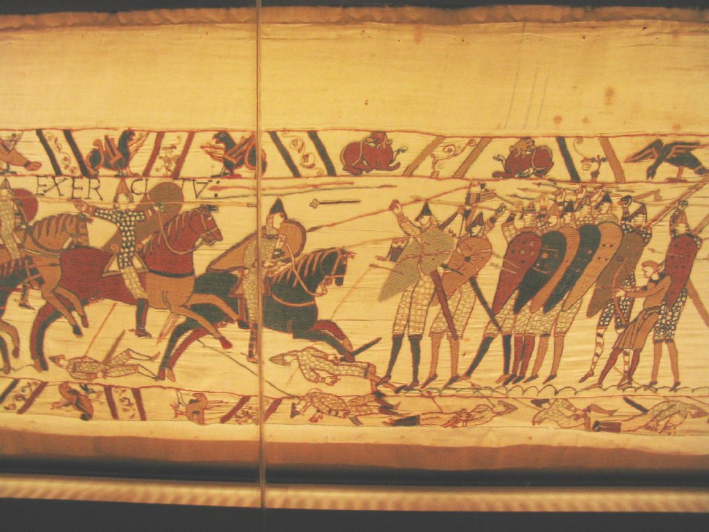 Bayeux Tapestry fragment